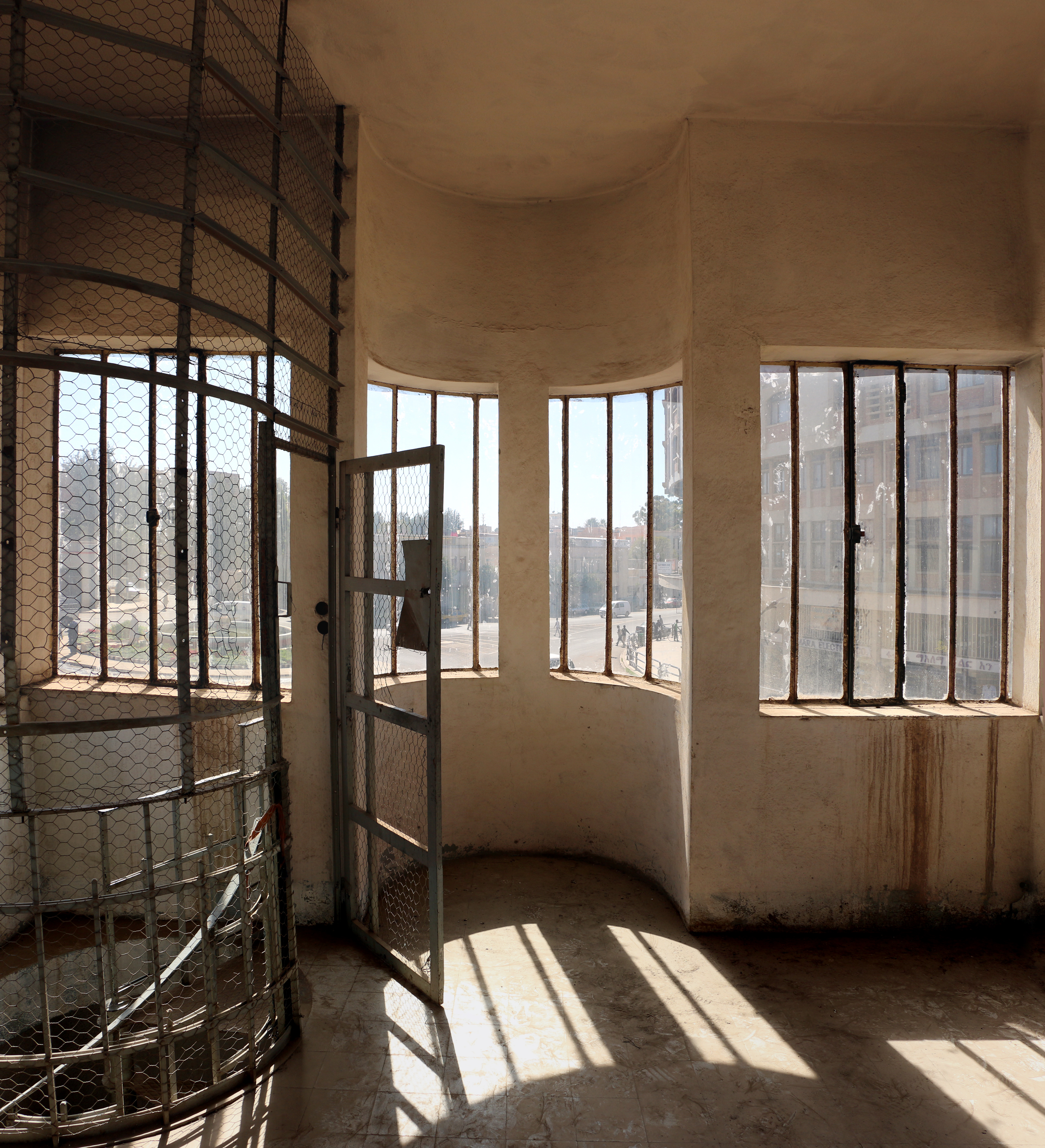 Fiat tagliero, interno 04,1.jpg